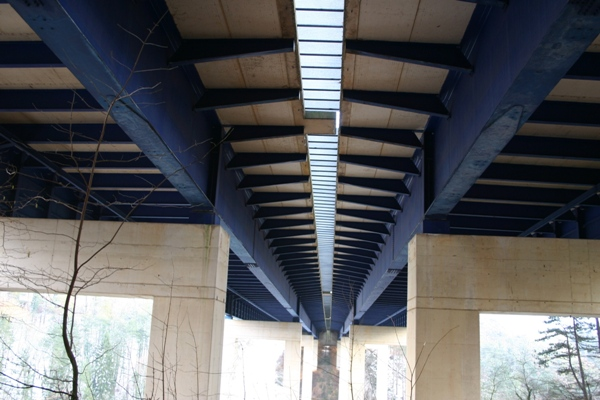 Den Tablier vum Viaduc vu Sécheval am August 2005 Kategorie:Brécken an der Belsch